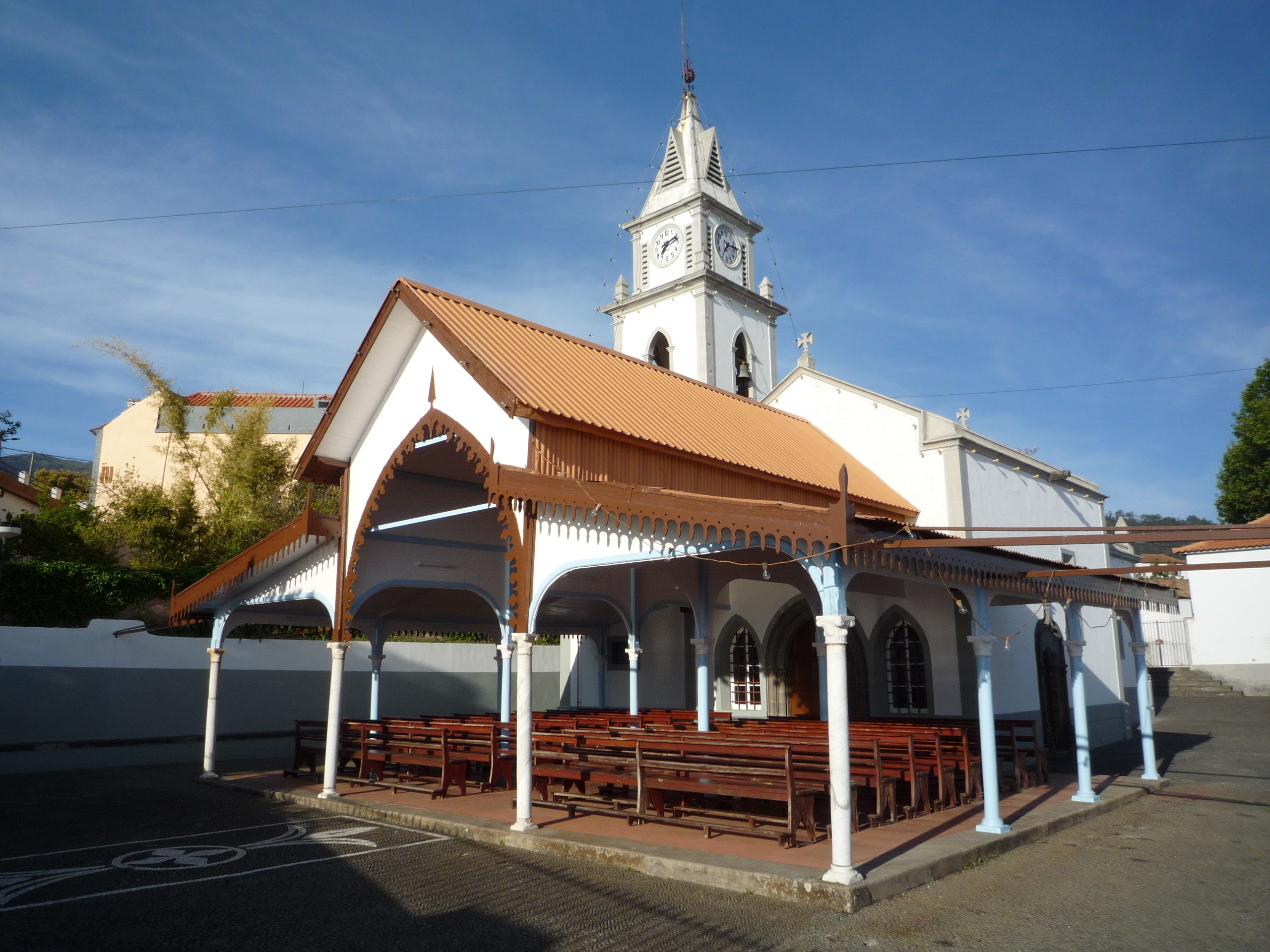 The Capela de Nossa Senhora do Loreto in Caminho do Salão, Arco da Calheta, Madeira. More images